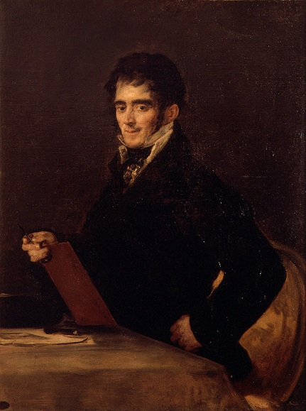 Retrato del grabador español Rafael Esteve Vilella (1772-1847).